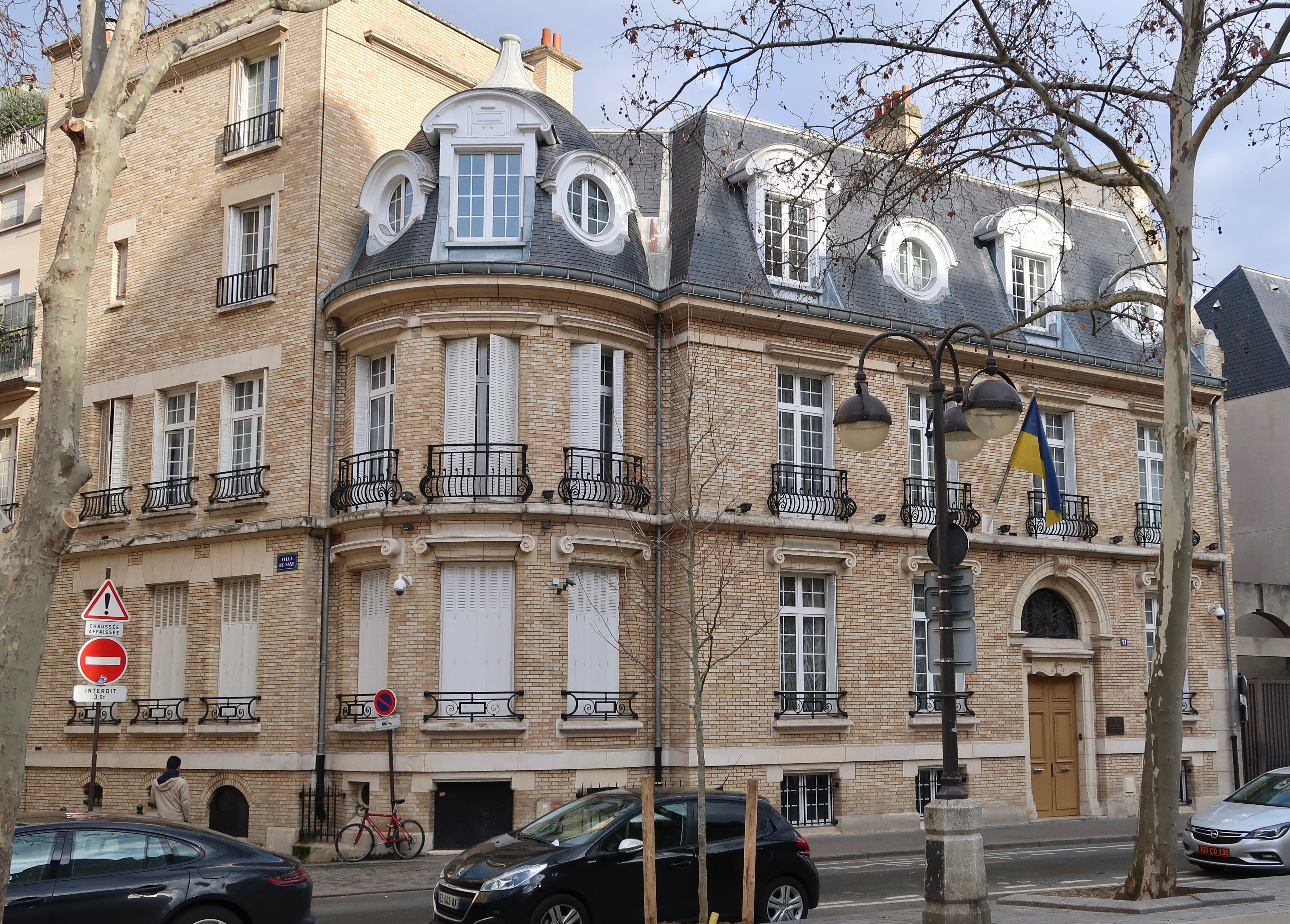 Ambassade d'Ukraine en France, 21 avenue de Saxe (Paris, 7e).